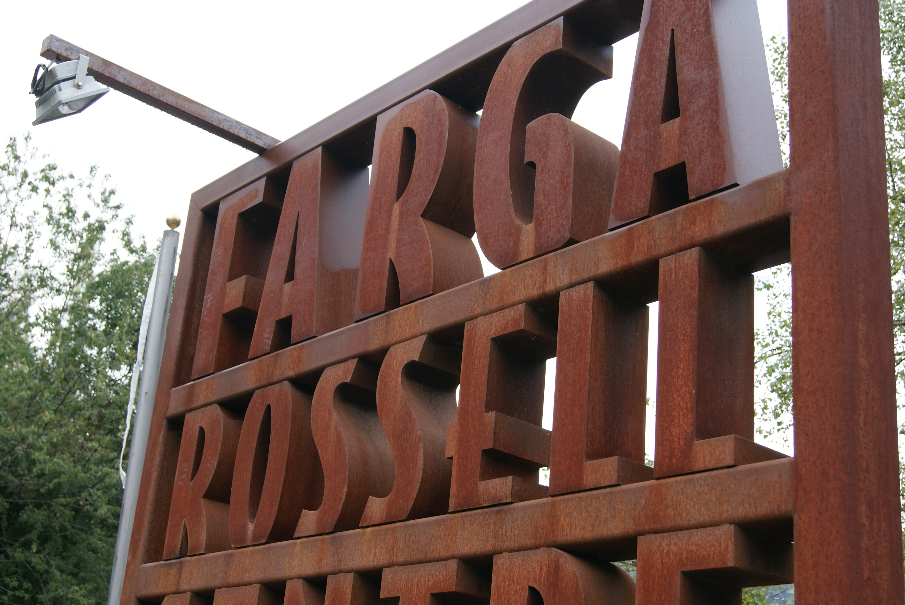 Farga Rossell (La Massana)